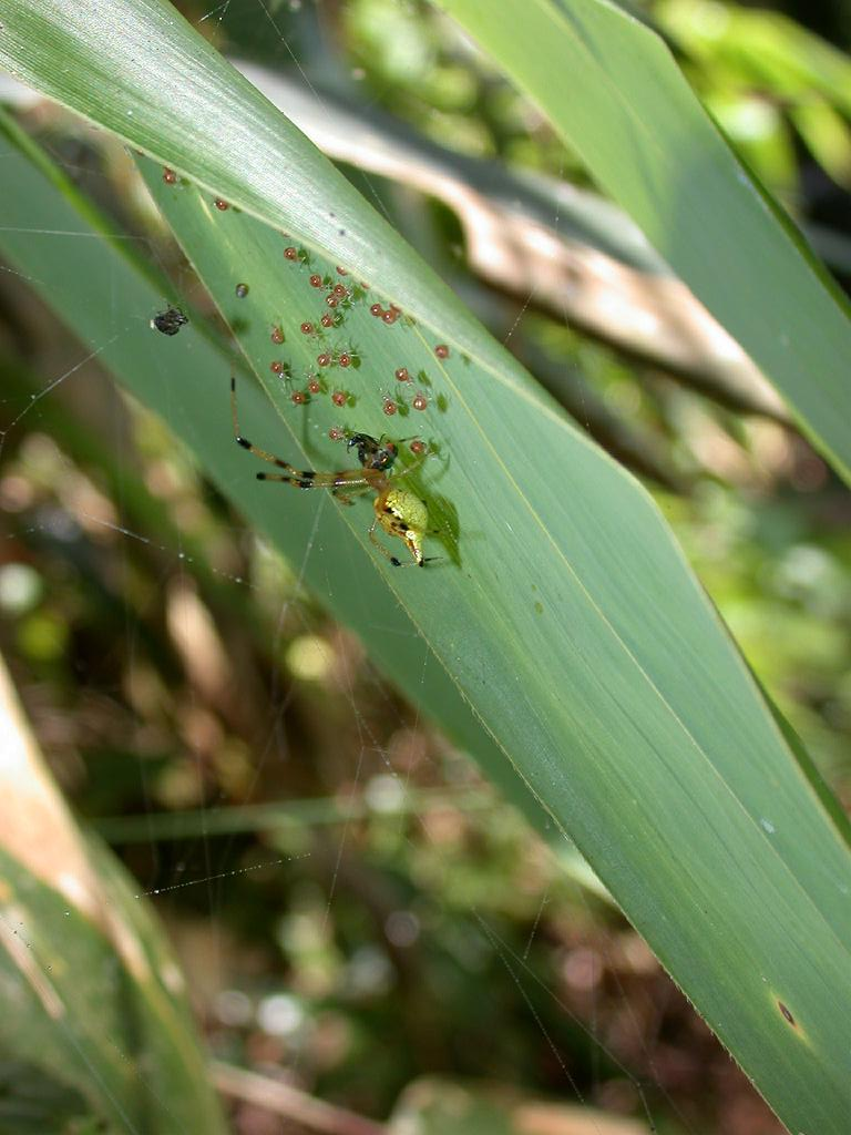 Chrysso scintillans：コガネヒメグモ 2006/08/06 和歌山県・高野山：Kouyasan, Wakayama Pref. Japan